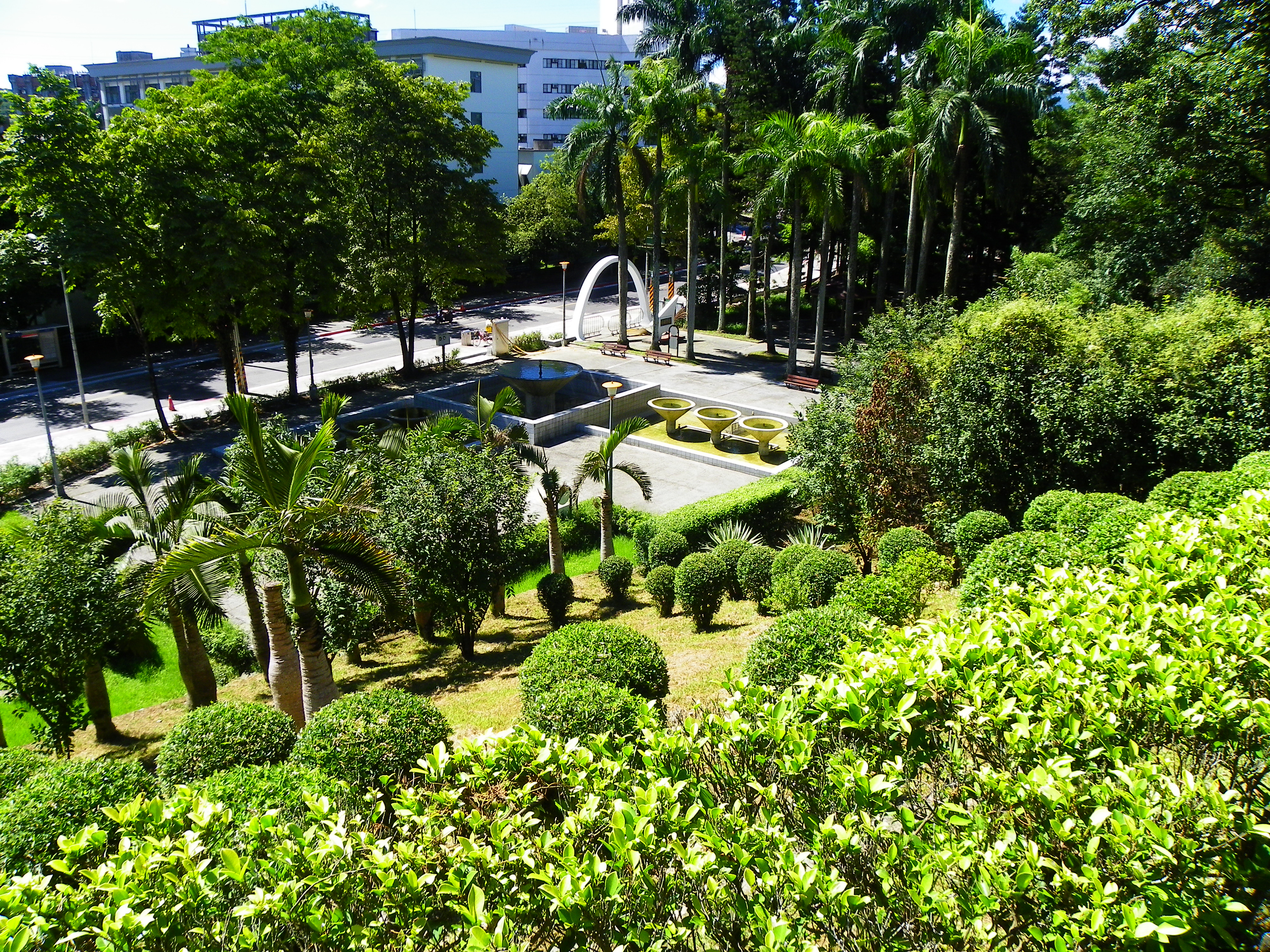 由胡適胸像前步道俯望胡適公園前庭。